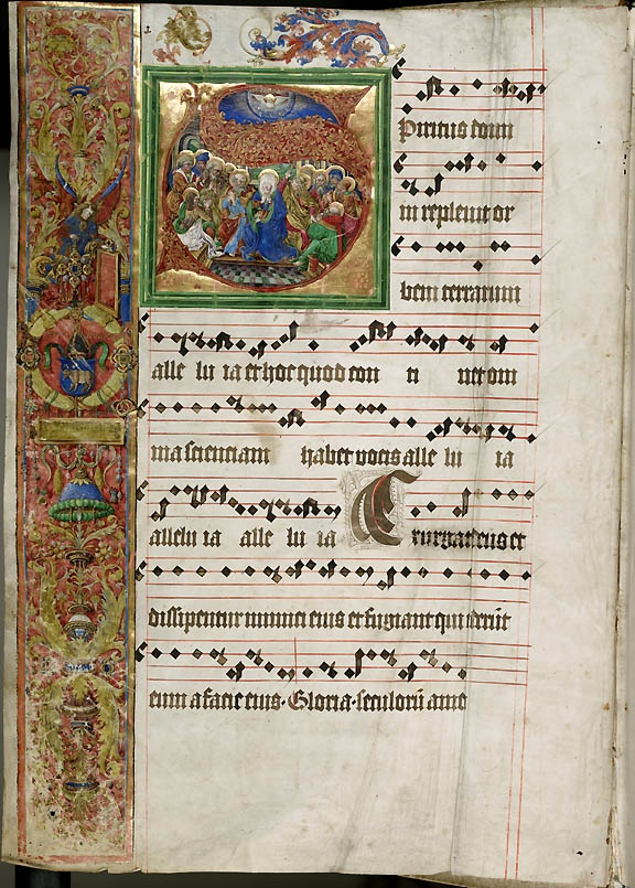 Graduál loucký (1499), titulní strana. Vědecká knihovna v Olomouci, signatura M IV 1